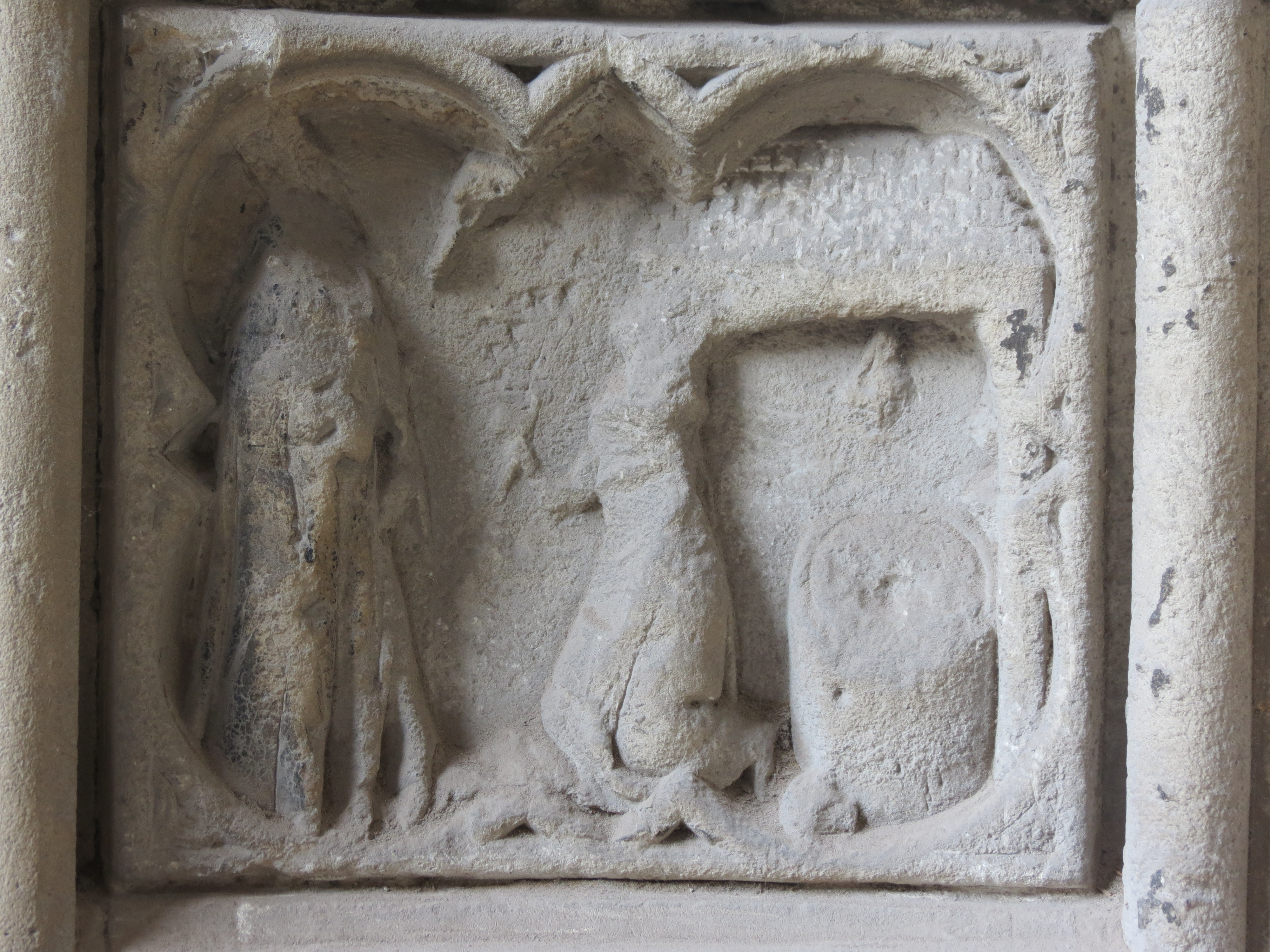 Détail du 7e médaillon du portail des Marmoussets dont la lecture est en boustrophédon représentant Ouen guérissant un meunier paralytique lors d'un voyage en Anjou.